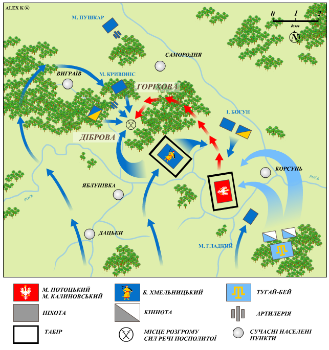 Битва під Корсунем